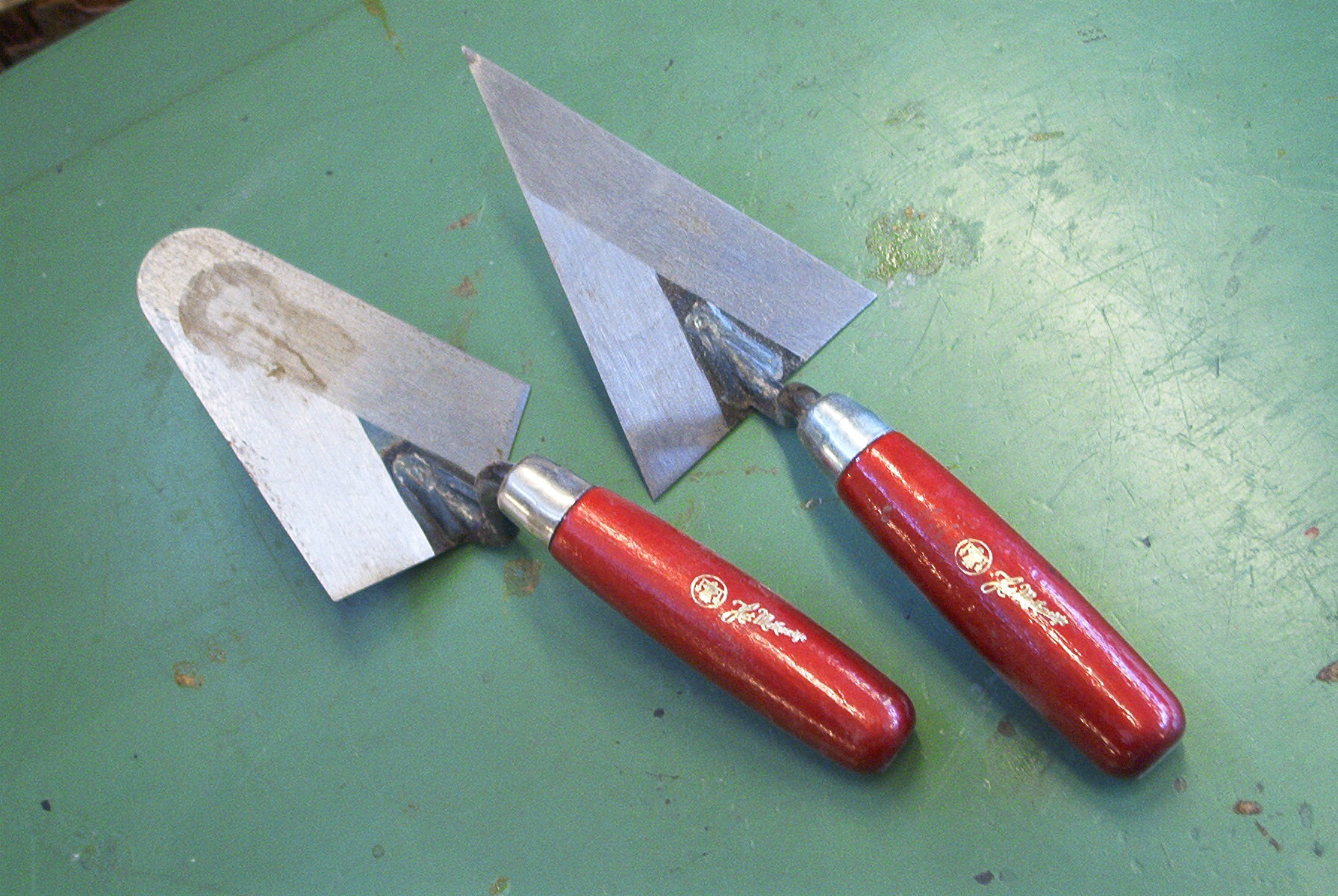 zelfgemaakte foto bestemd voor publiek domein. Martink